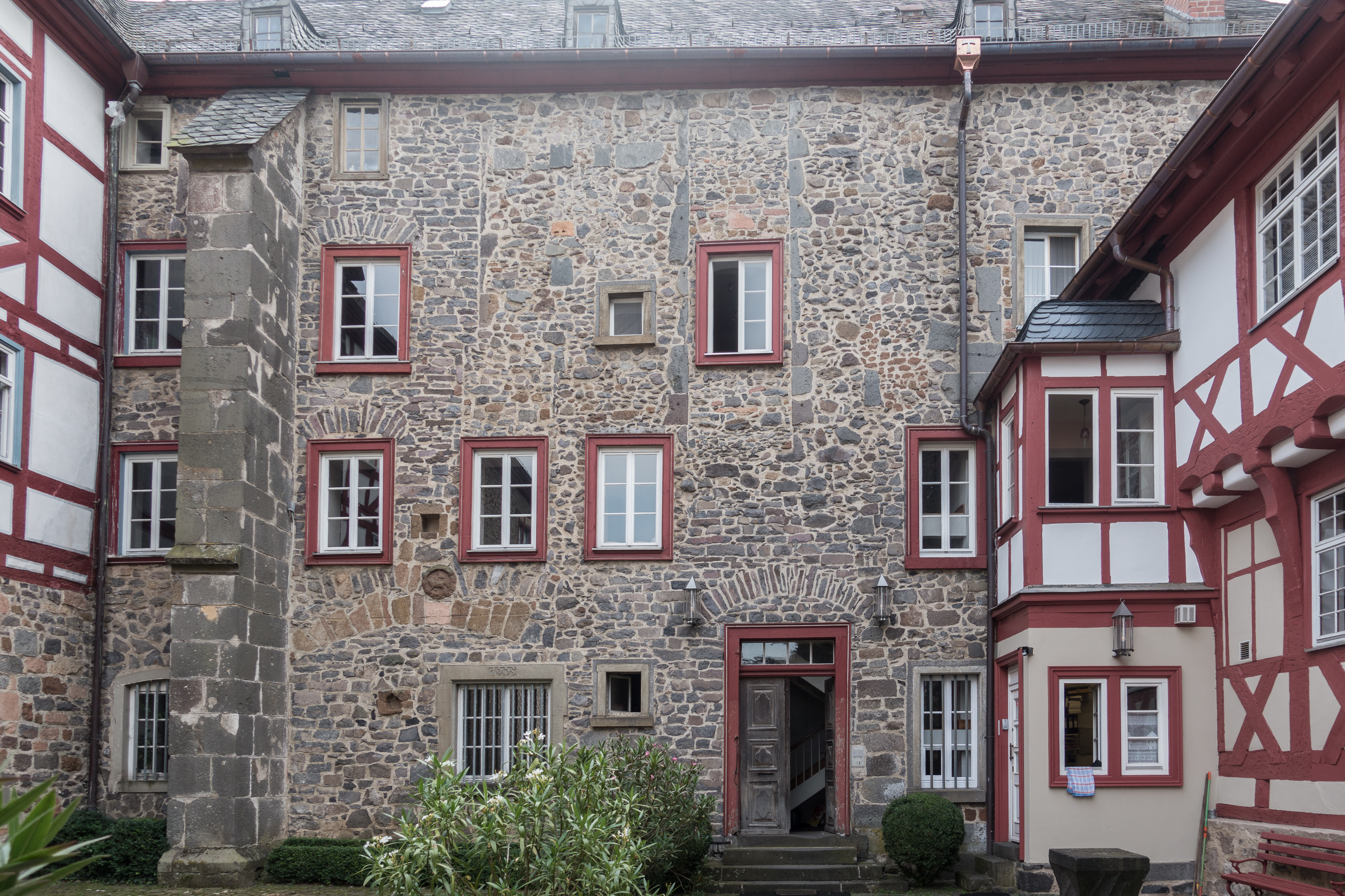 Ehem. Kirche vom Innenhof (Osten) aus gesehen. Das Antoniterkloster in Grünberg wurde um 1200 gegründet und bestand bis zur Einführung der Reformation in der Landgrafschaft Hessen im Jahre 1526. Ab 1577 wurde die Anlage zu einem landgräflichen Schloss (Wittwensitz) umgebaut.